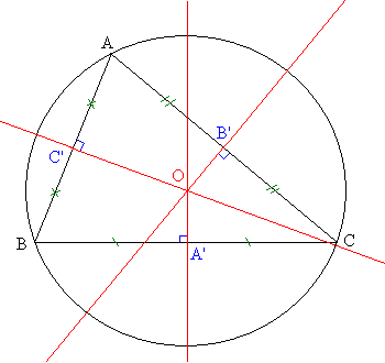 Autor: Usuario:Romero Schmidtke De